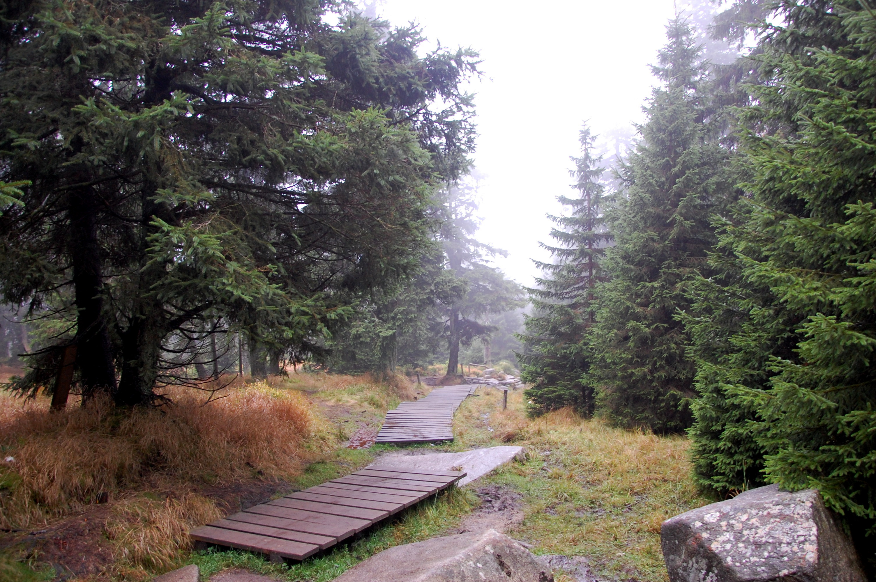 Eckerlochstieg